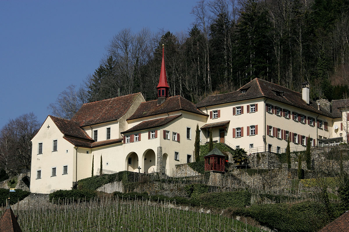 Kapuzinerkloster Allerheiligen in Altdorf